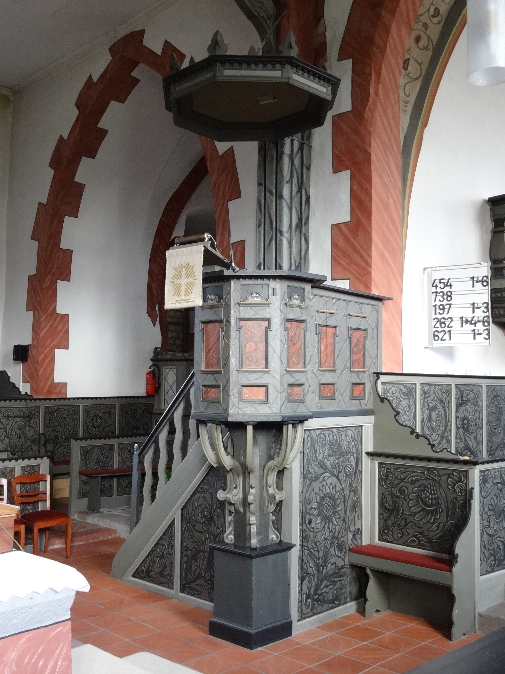 Ev. ref. Kirche Grüningen